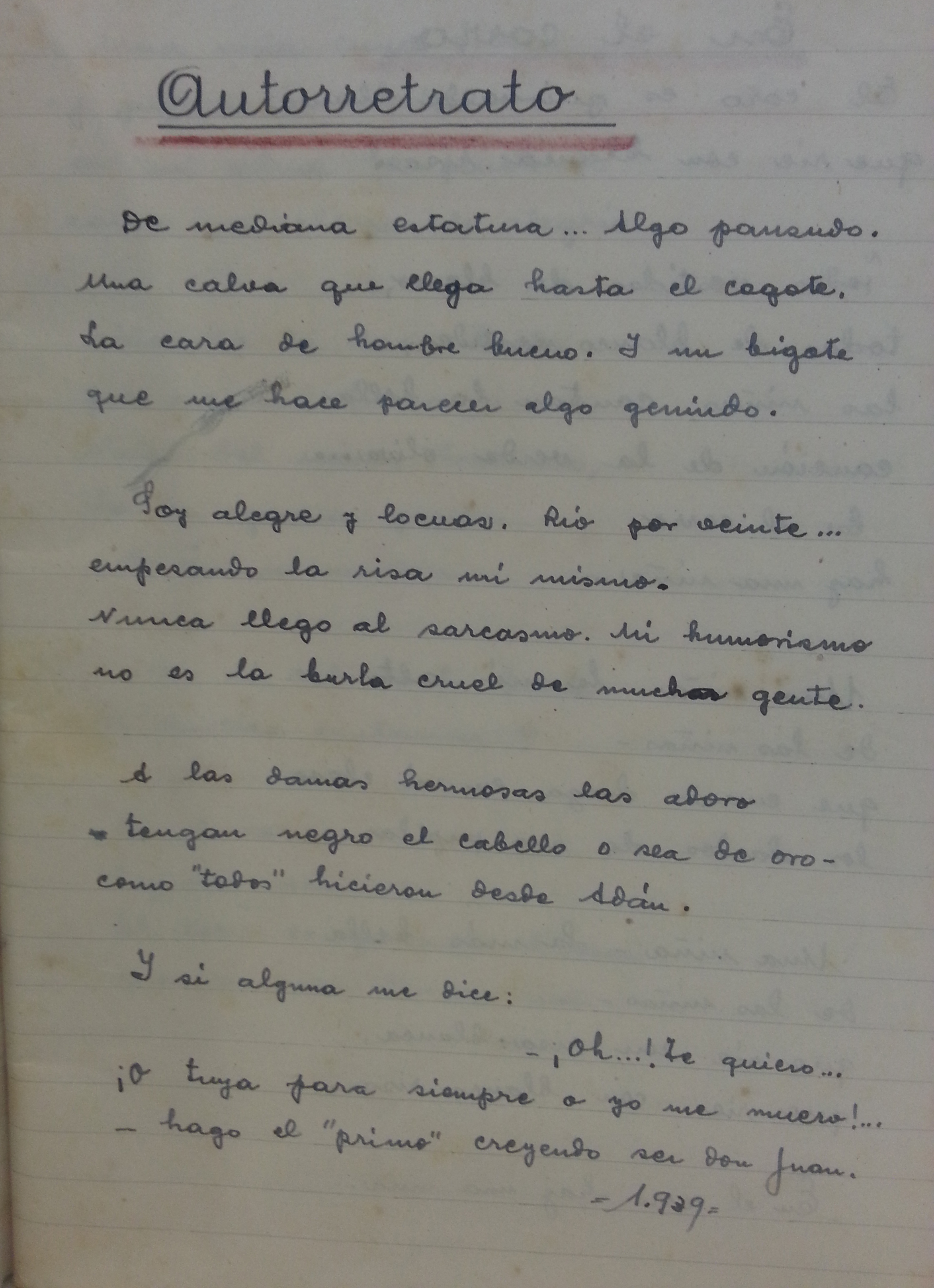 Poema autorretrato de Manuel Antonio Arias "Antón de la Braña"